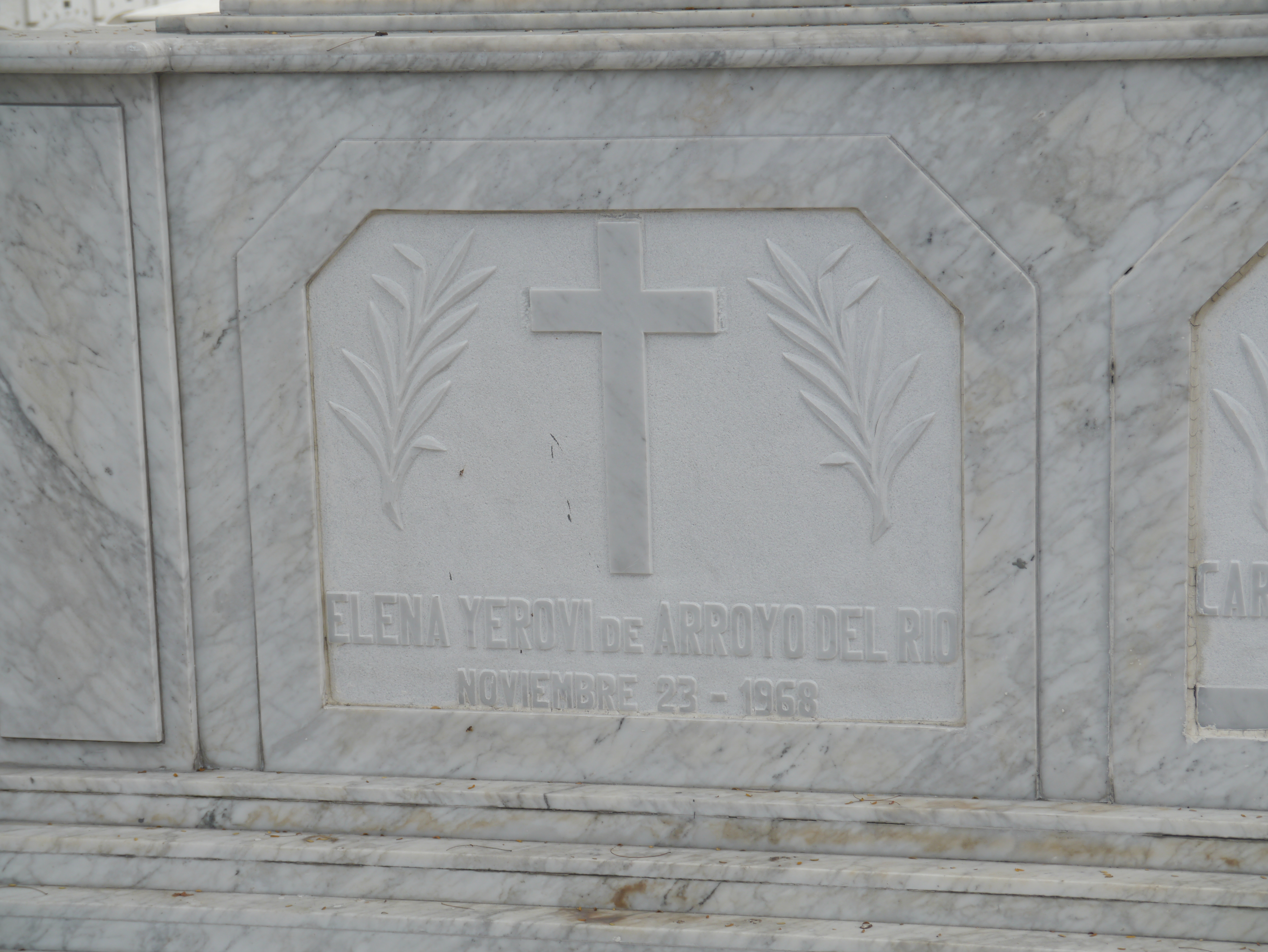 Tumba de la esposa del ex-presidente Carlos Alberto Arroyo del Río en el Cementerio Patrimonial de Guayaquil